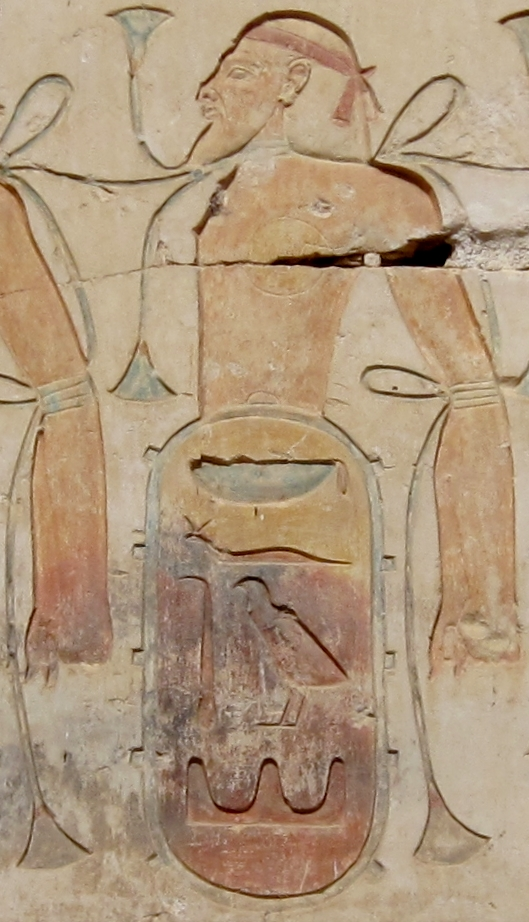 Darstellung eines gefangenen Kriegers aus Keftiu (Kreta) an der Nordwestwand neben dem Eingang zur Kapelle Ramses II. im Tempel Ramses II. in Abydos, Ägypten